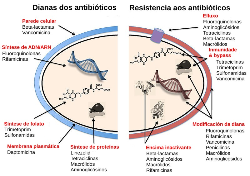 Mecanismos de resistencia a antibióticos